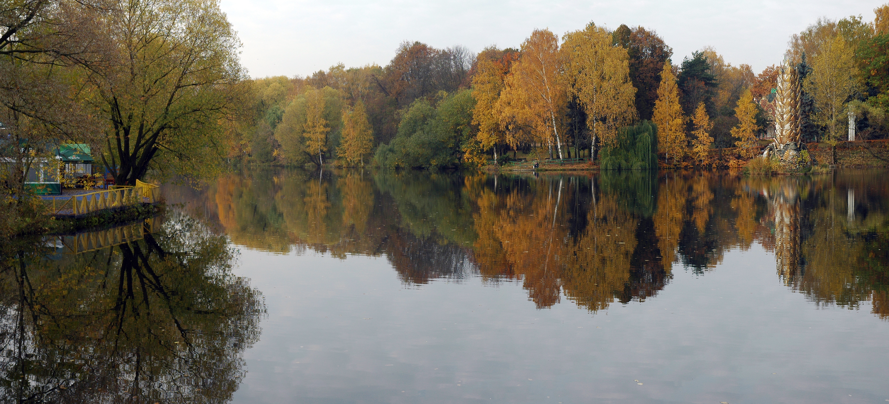 Фонтан «Золотой колос» (Москва и Московская область, Москва, Мира проспект, 115)